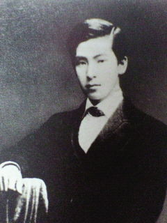 アメリカ合衆国ハーバード大学法学部留学時代の小村寿太郎（22歳）